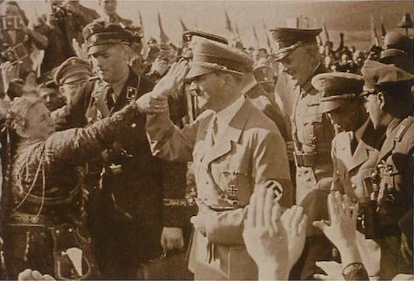 Postkarte Hitler leibhaftig zu berühren war von vielen Festteilnehmern heiß ersehnt, gelang aber nur wenigen